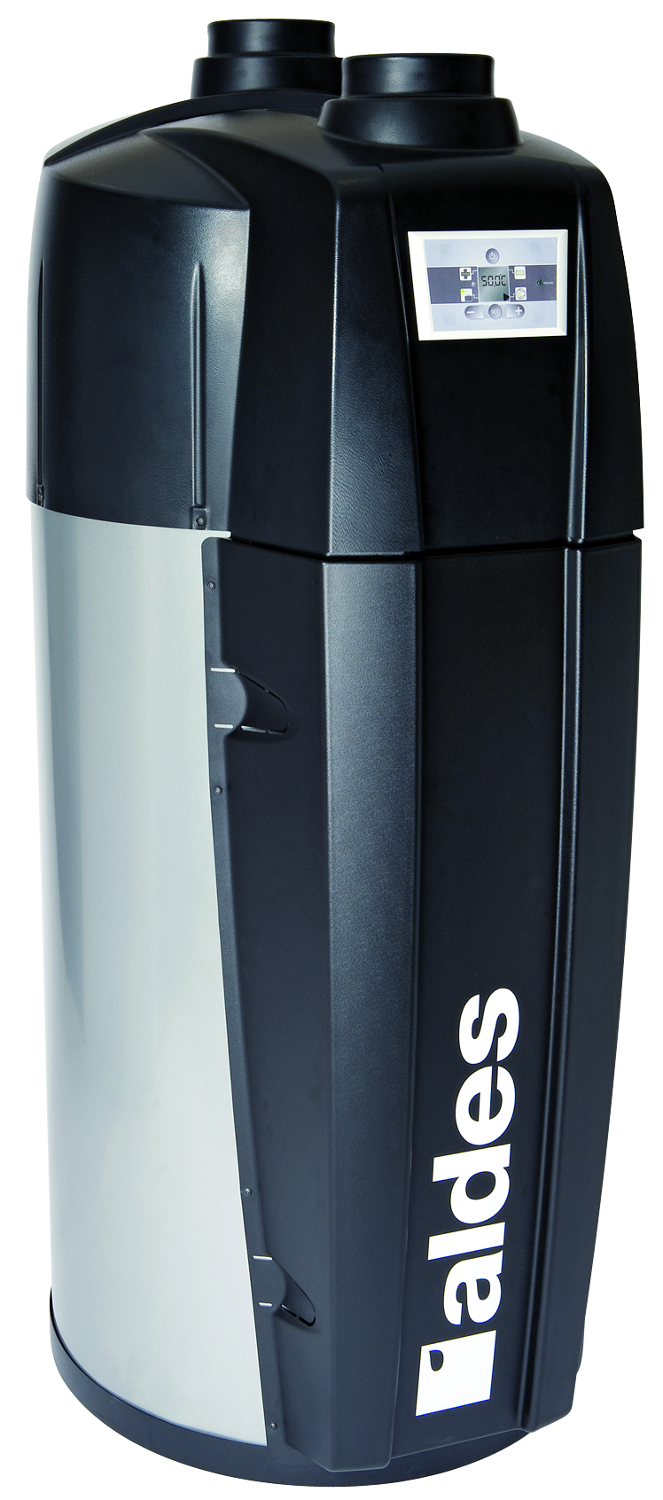 Chauffe-eau thermodynamique, Aldes